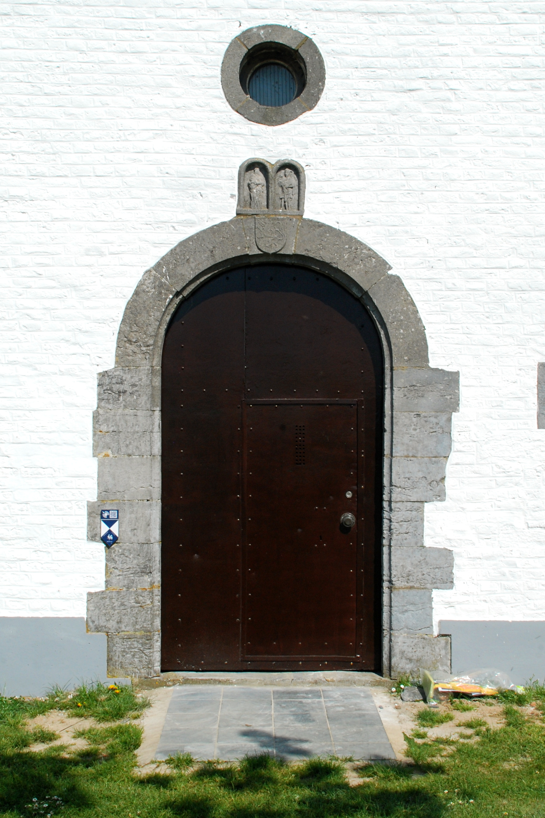 Belgique - Bousval - Chapelle du Try-au-Chêne